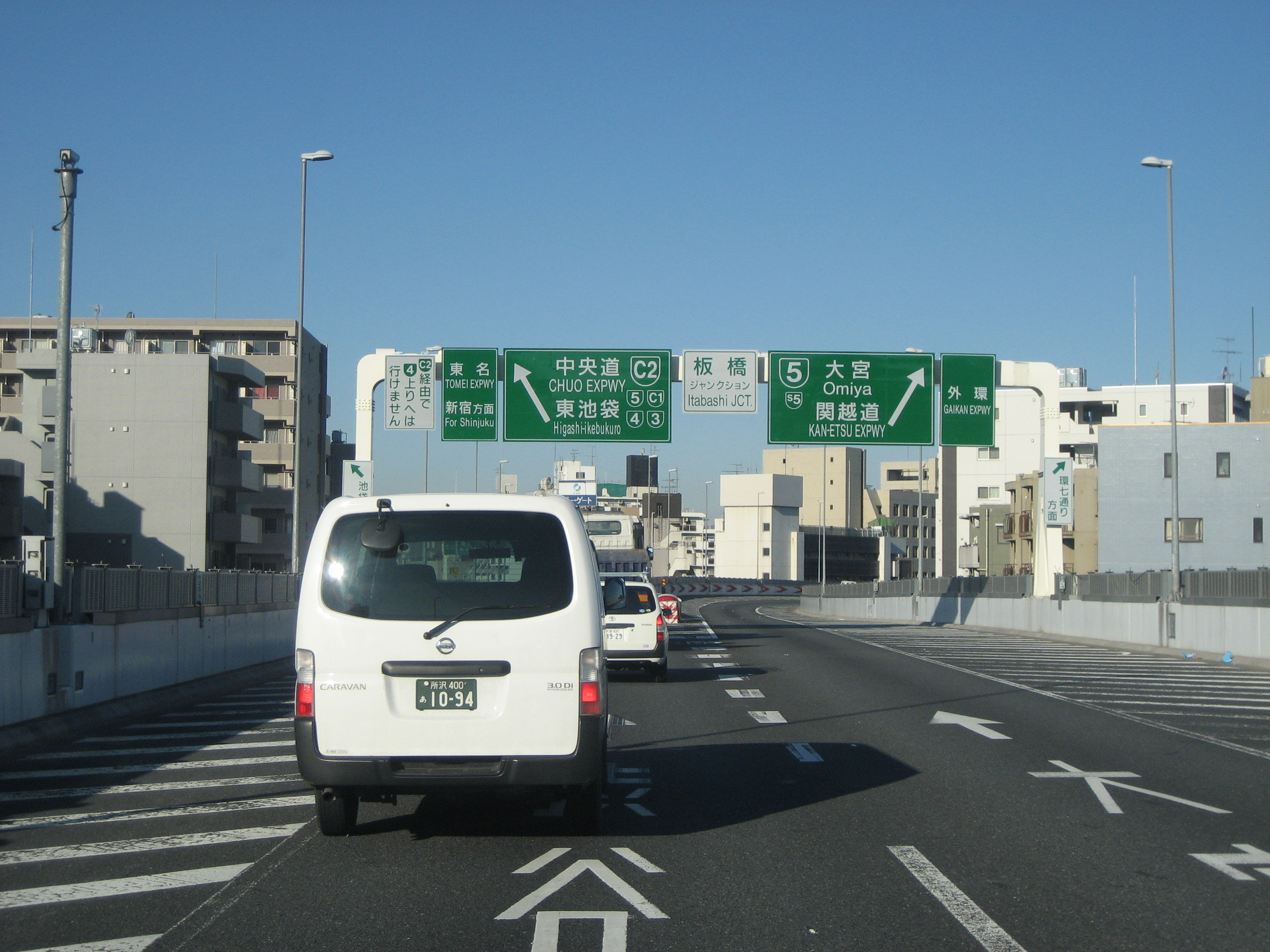 首都高速道路中央環状線板橋JCT付近